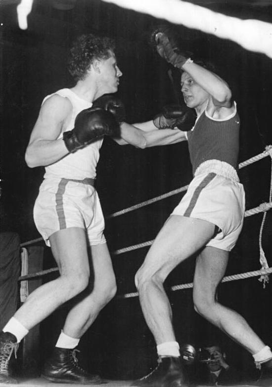 Kurschat, Langpol Zentralbild Funck 5.4.52 Boxgroßkampftag in der Werner-Seelenbinder-Halle. Zur Förderung der Einheit im Deutschen Sport fand am 4.4.52 in der Werner-Seelenbinder-Halle in Berlin ein Boxgroßkampf statt. Es standen sich gegenüber der Westberliner und norddeutsche Mannschaftsmeister"Neuköllner Sportfreunde" und der DDR-Mannschaftsmeister BSG "Empor Nord Berlin". UBz: (Neukölln: weißes Hemd) Im Leichtgewicht kämpften Kurschat (links), Berliner Meister 1951 und Olympia-Kandidat, und Langpol unentschieden.